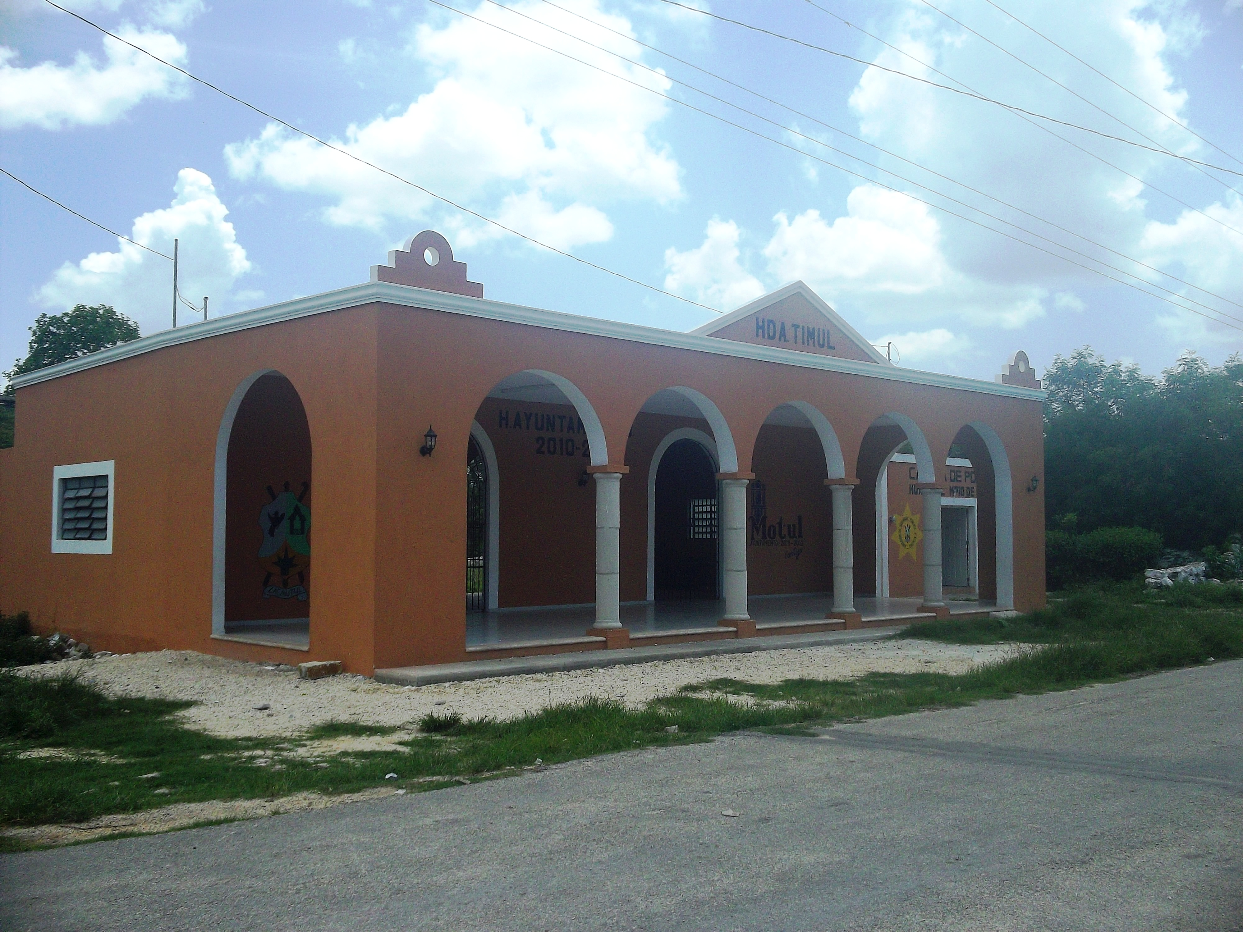 Casa comisarial de Timul, Yucatán.